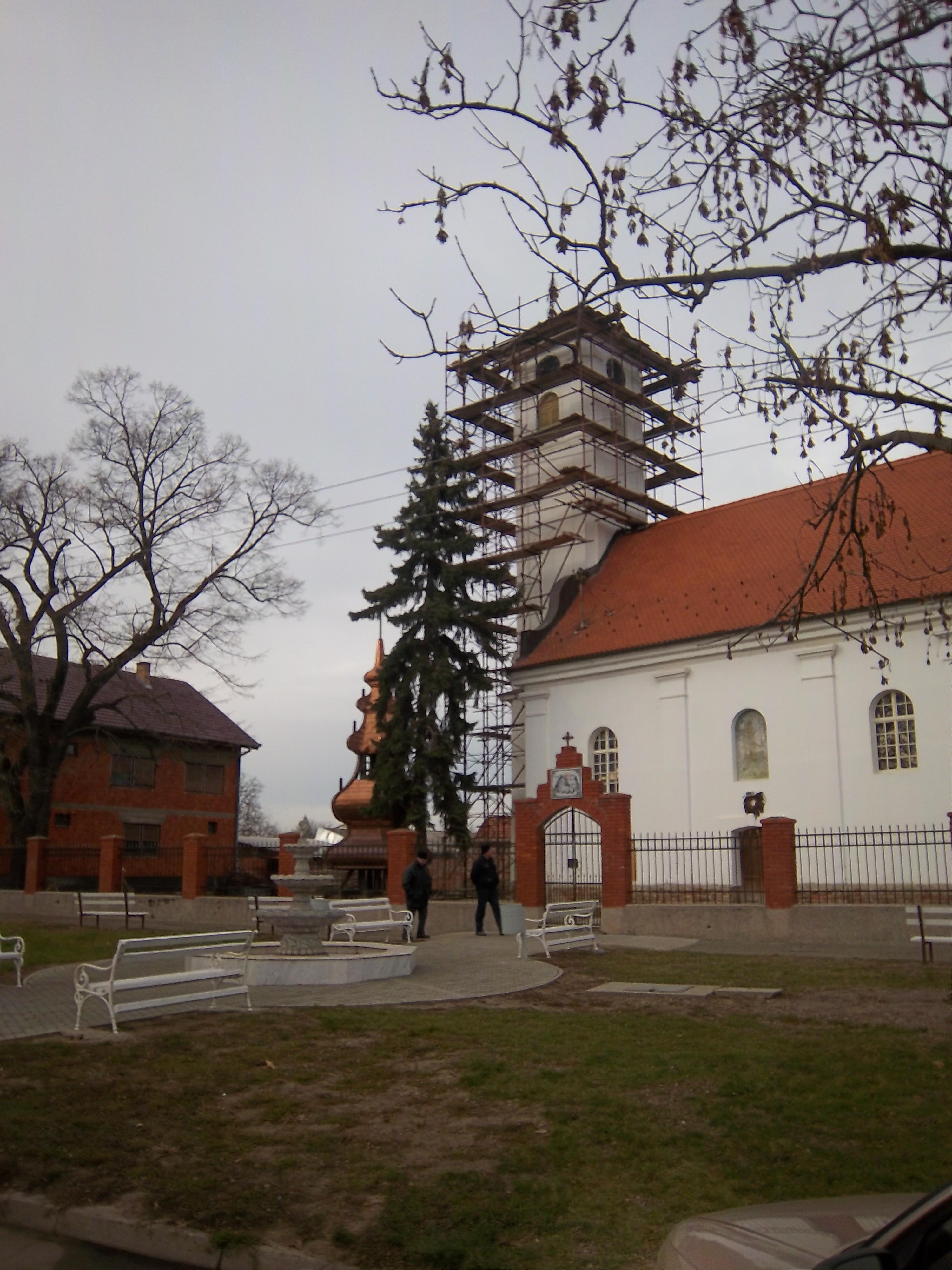 Pravoslavna crkva u Boboti za vrijeme restauratorskih radova, krajem 2011. godine.